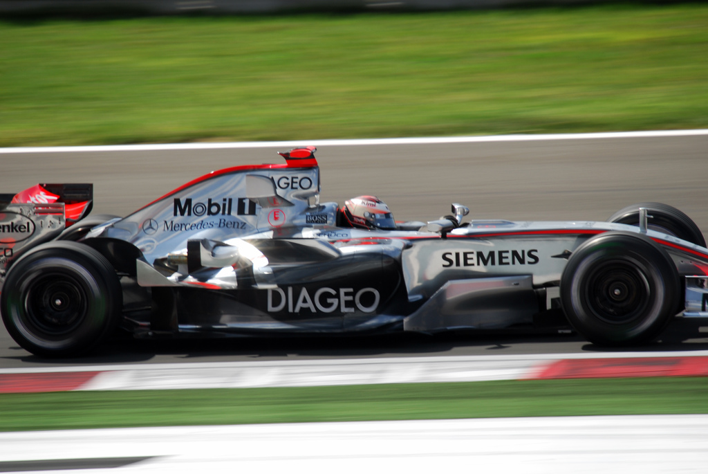 Kimi Räikkönen driving for McLaren at the 2006 Turkish Grand Prix.